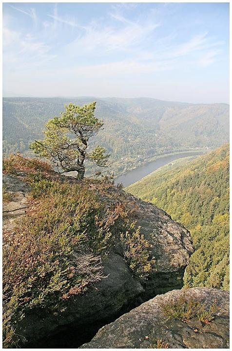 Pohled z Růžové vyhlídky autor: Prazak date: October 2006